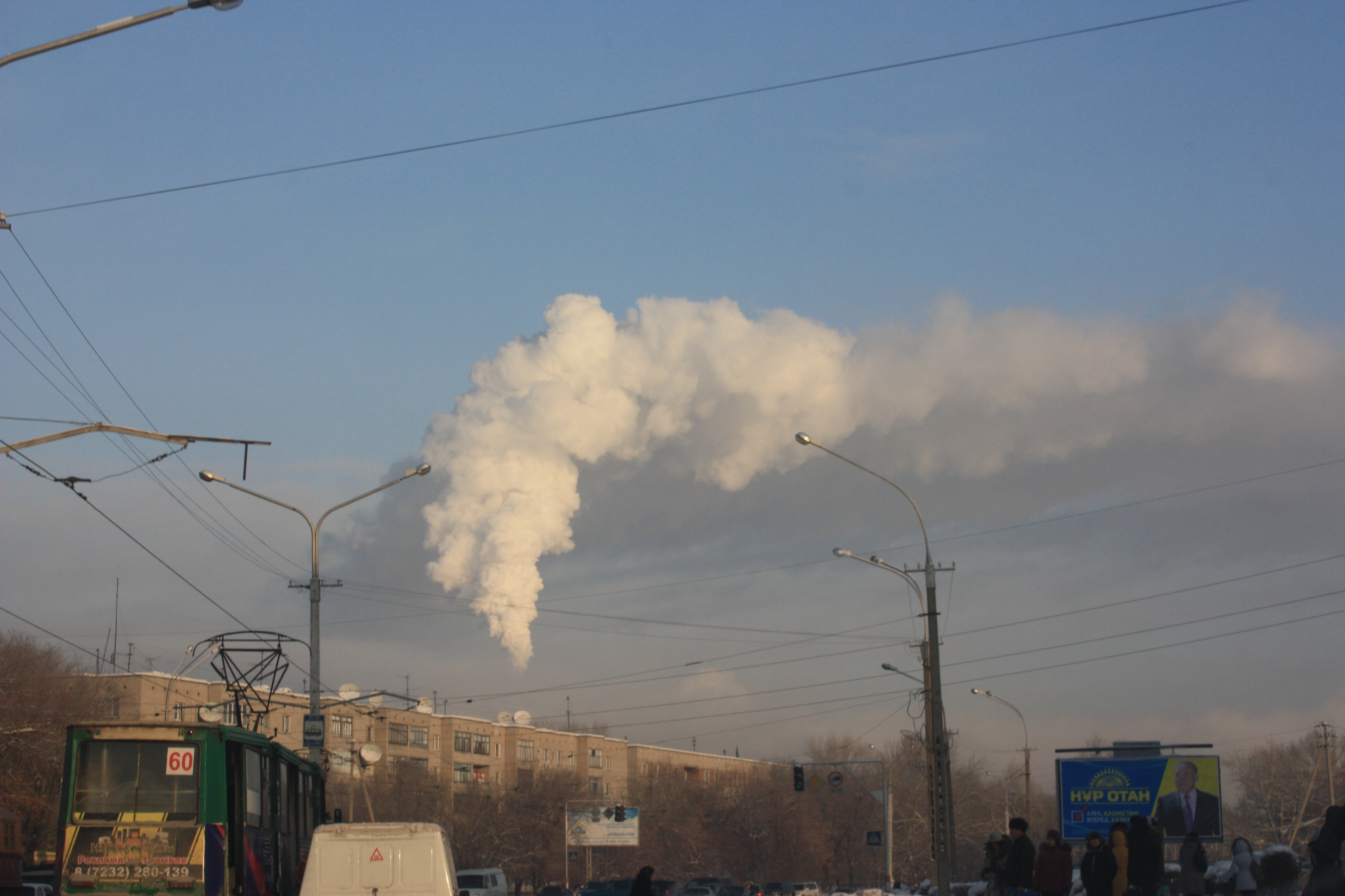 Ust'-Kamenogorsk 070000, Kazakhstan